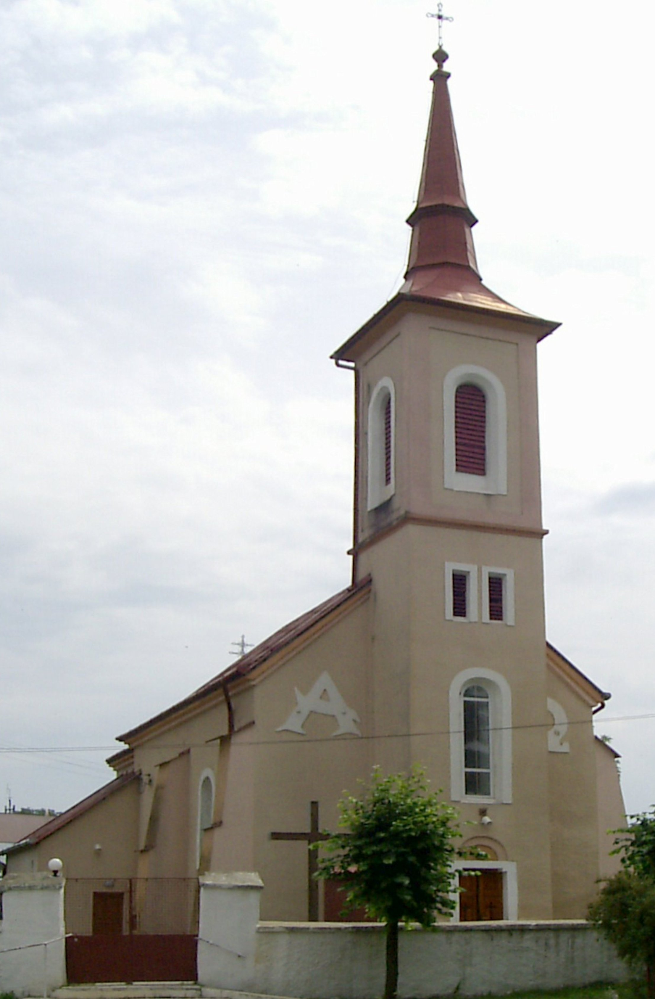 Rímskokatolícky kostol sv. Františka z Assisi Žalobín